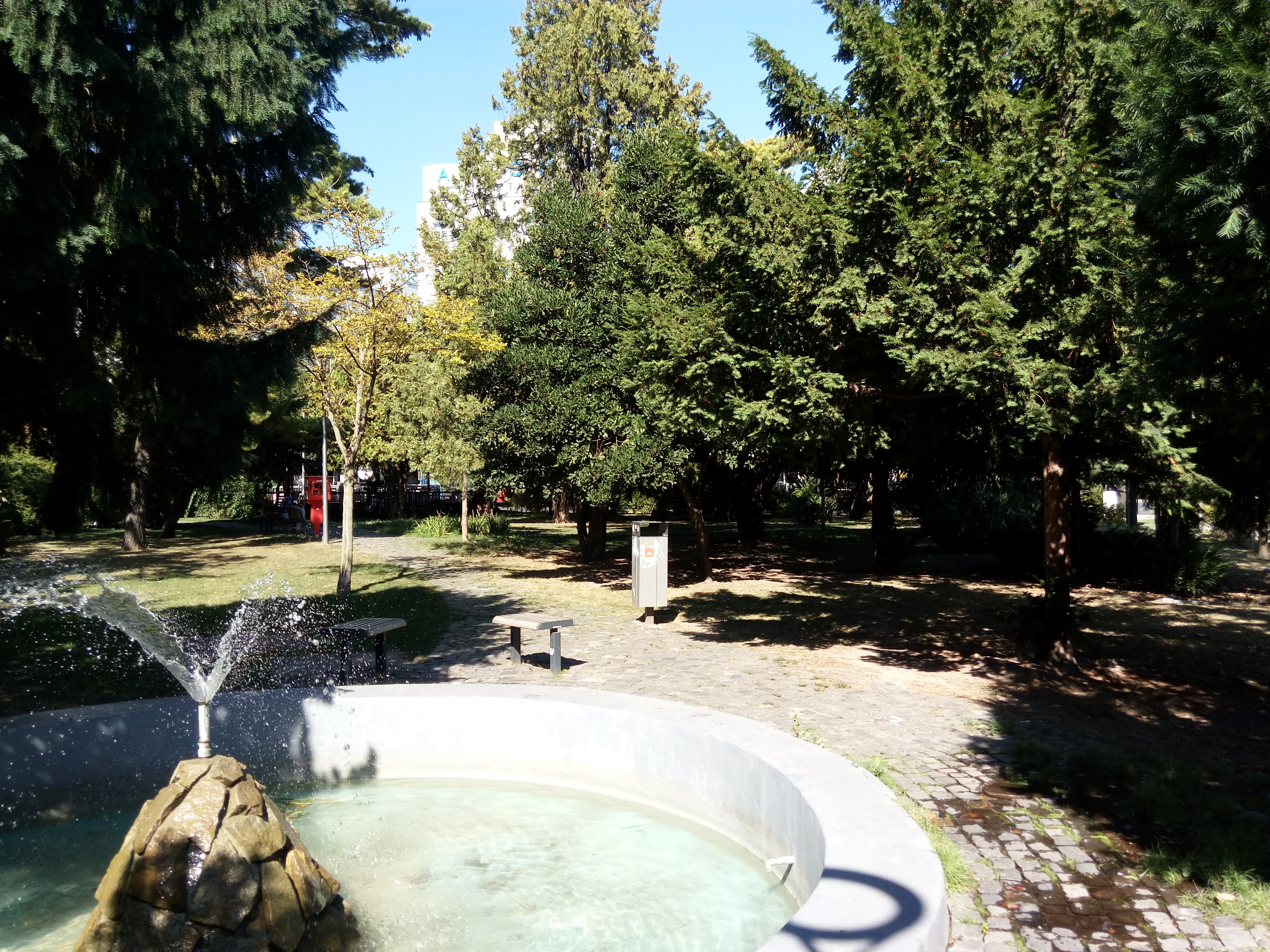 Parčík pri Avione, Staré Mesto, Bratislava